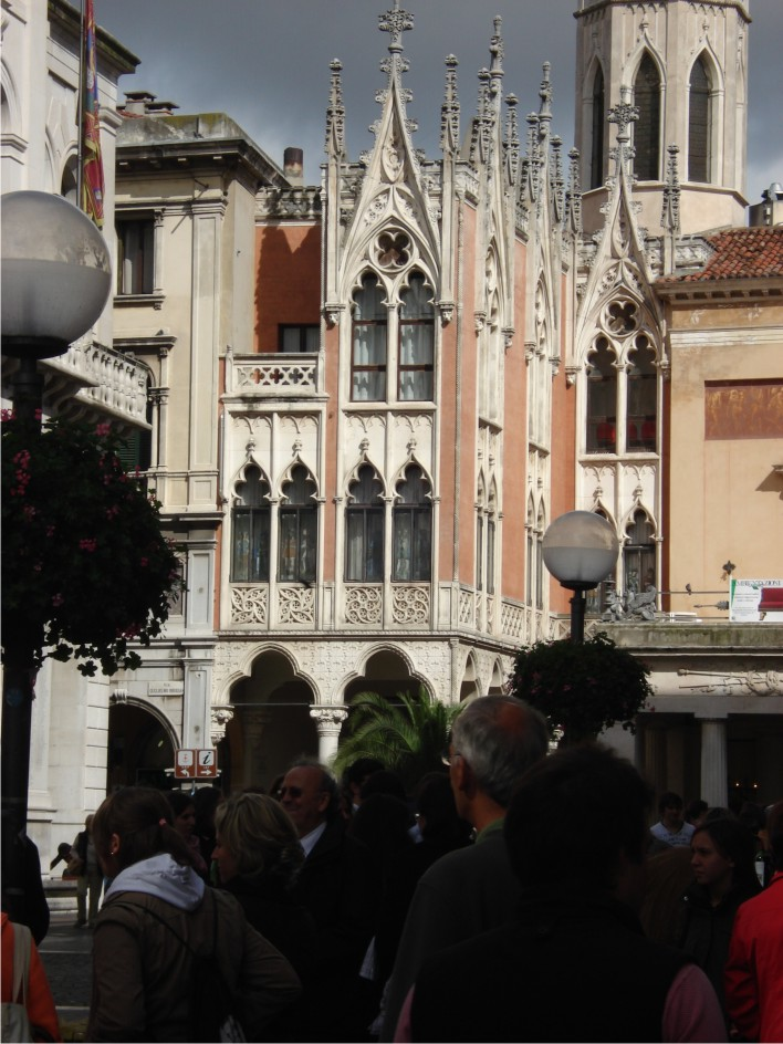 Кафе Педроки